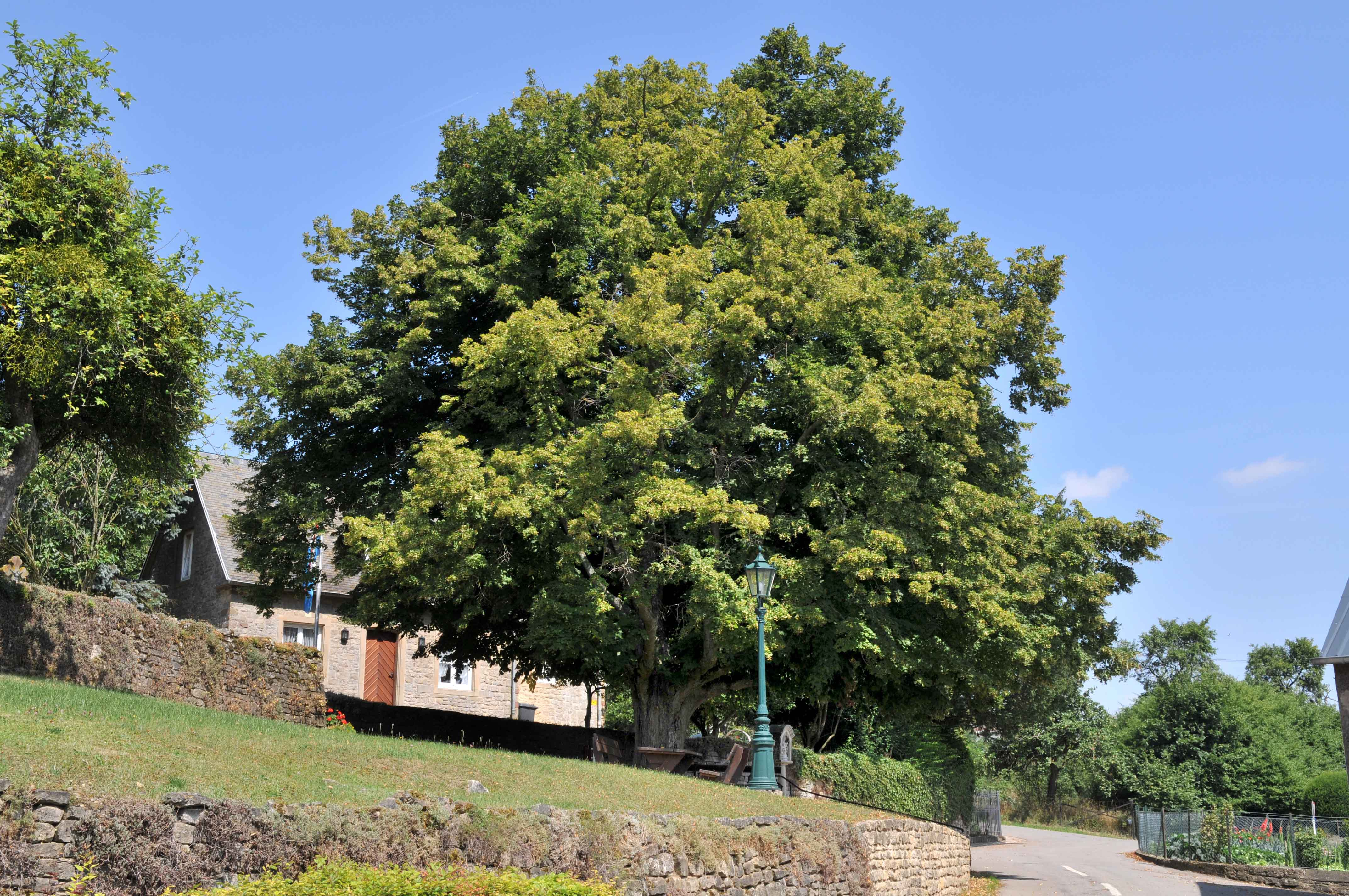 Bemierkenswäert Lann op der Giischterklaus.